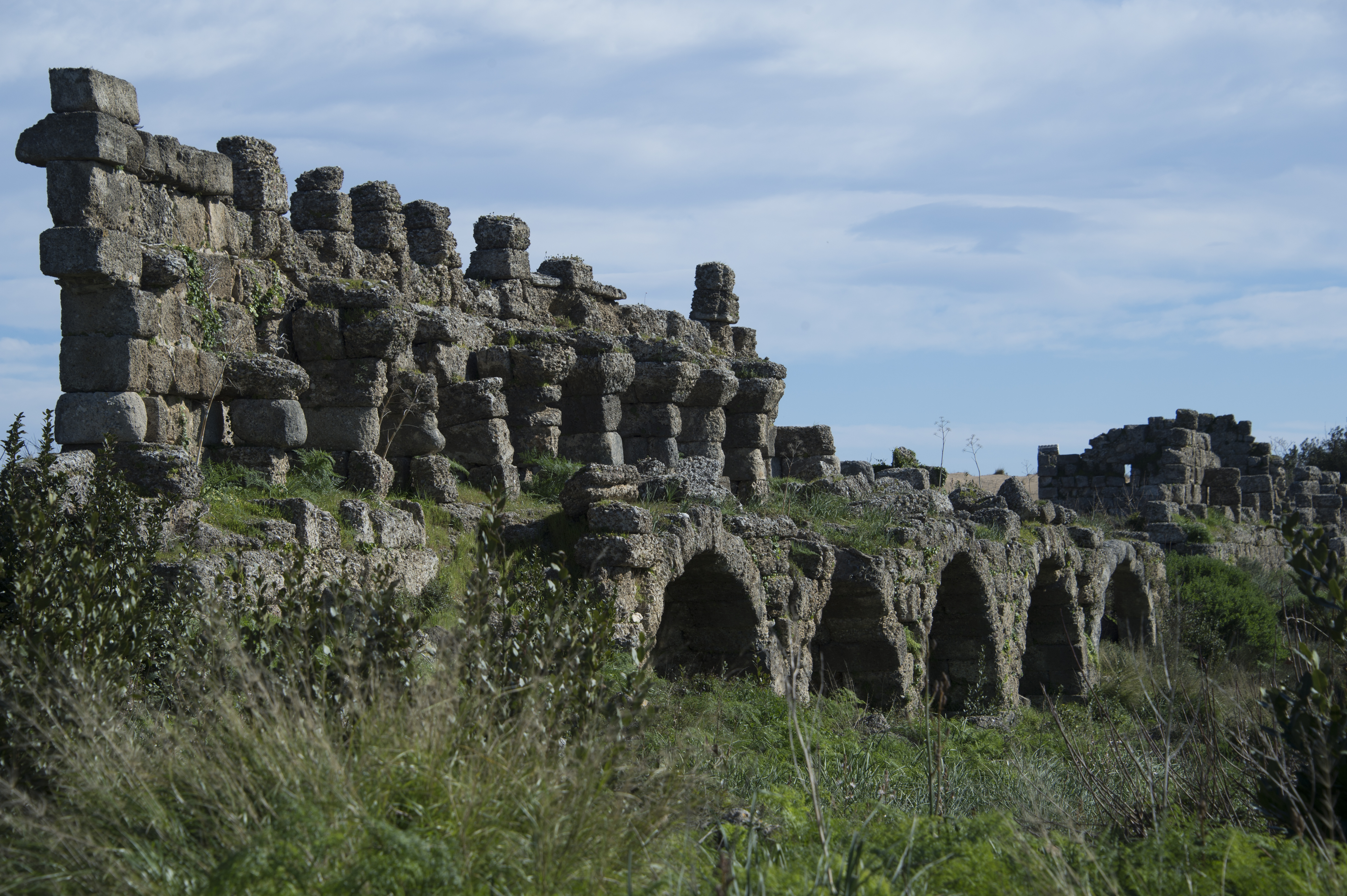 Deutlich zu erkennen ist der Aufbau der Mauer auf 3 Ebenen: Über den Stützbögen befanden sich 2 Wehrgänge. Rechts im Hintergrund ein Turm.